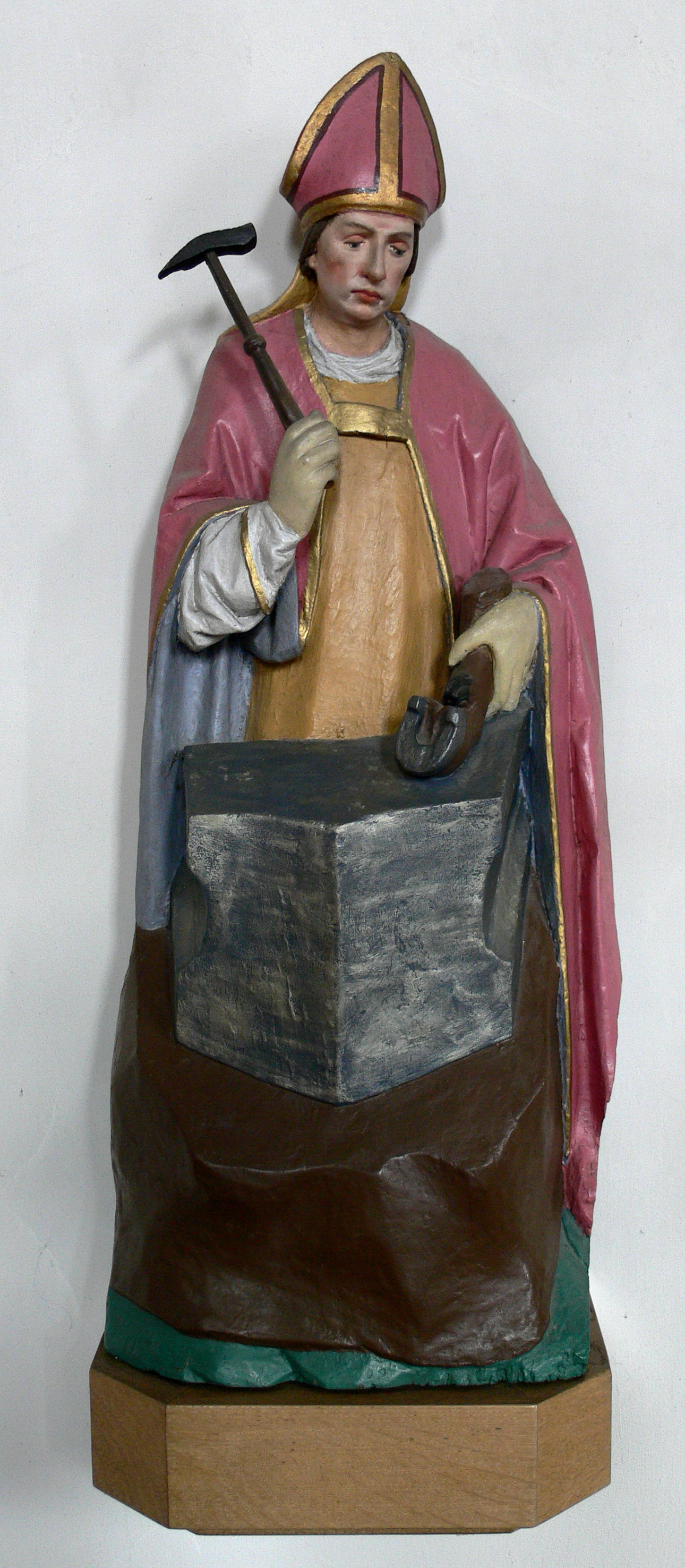 Kath. Pfarrkirche St. Michael, Ebersbach, Gemeinde Ebersbach-Musbach, Landkreis Ravensburg Hl. Eligius